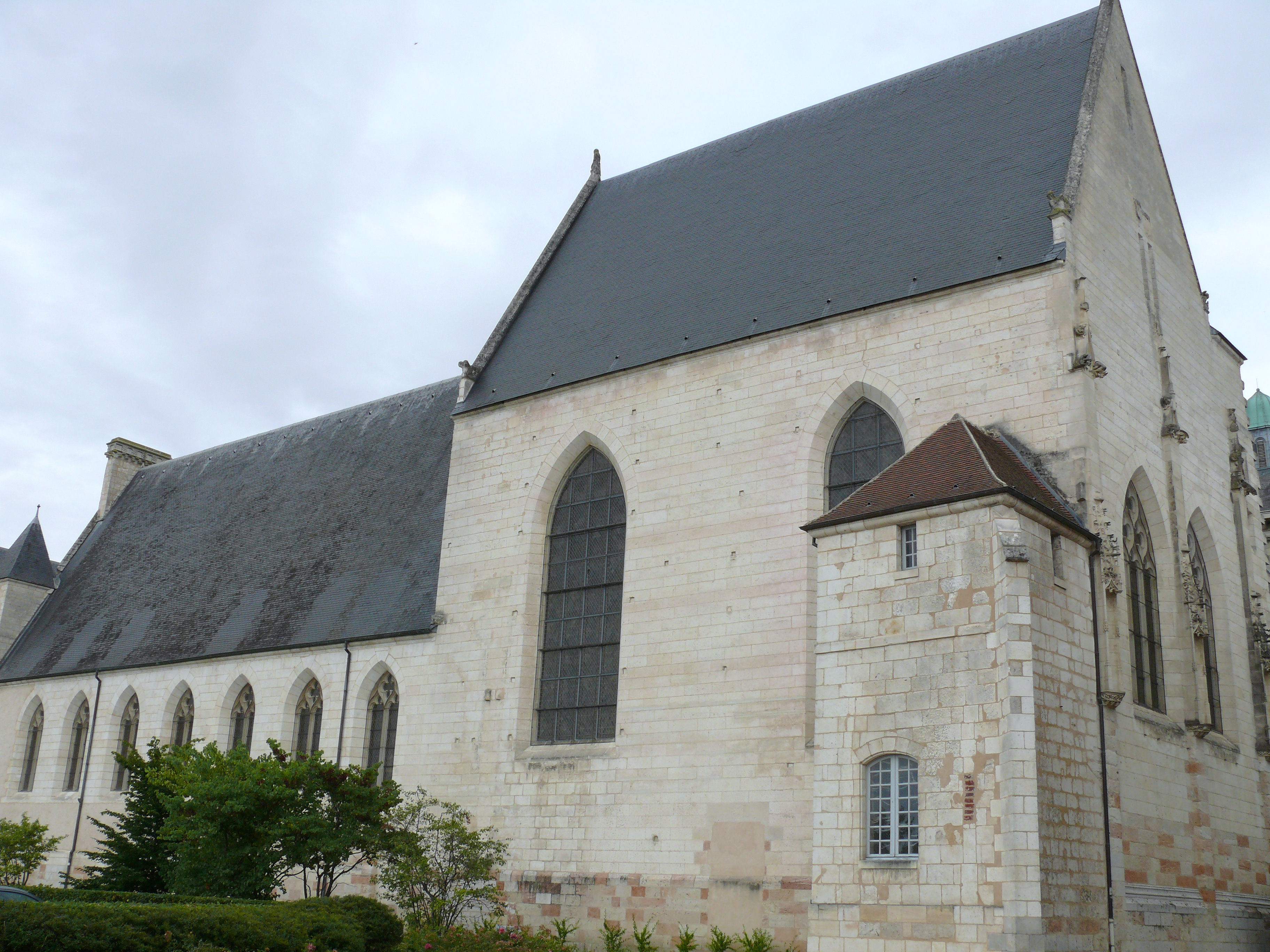 Bourges - Hôtel-Dieu - Chapelle et chambre des malades vues de la rue Gambon